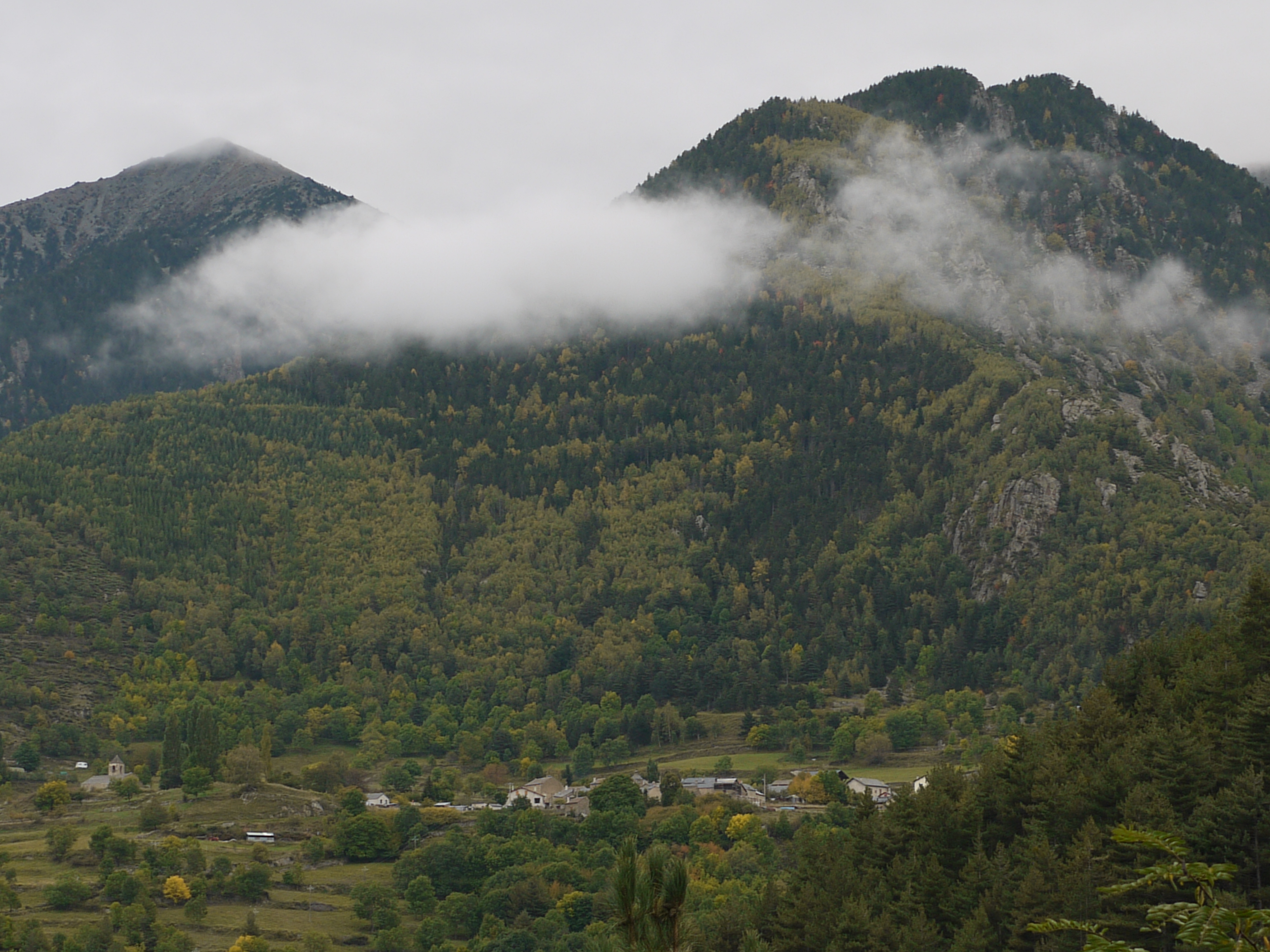 Vue générale de Prats-Balaguer.